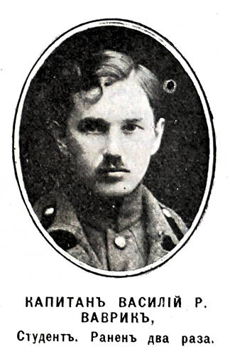 Василий Романович Ваврик